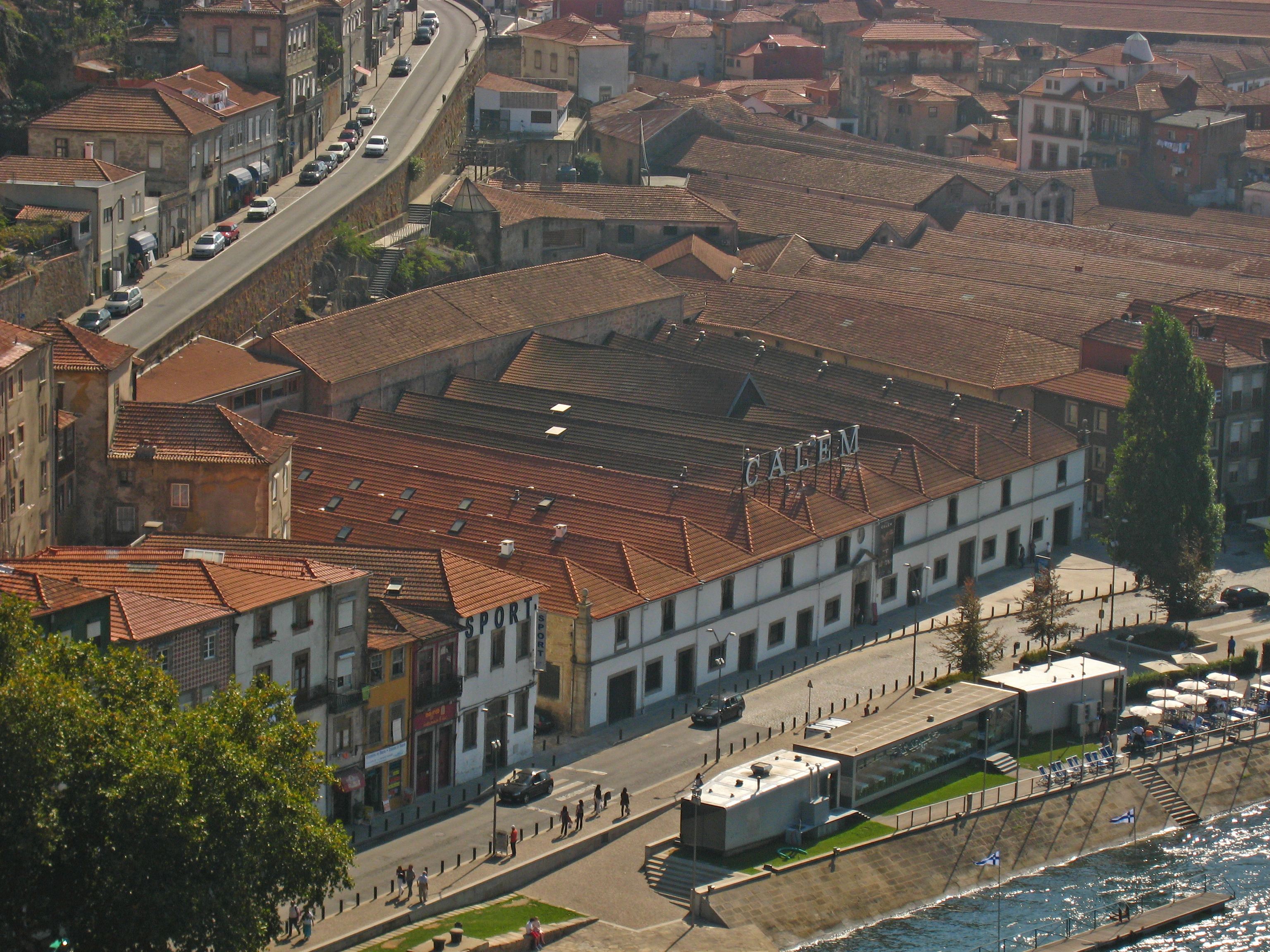 Portugal - Porto - View from Ponte Luis I - Gaia